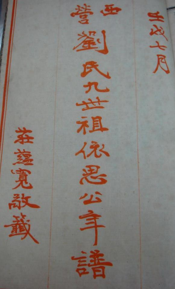 莊蘊寬題簽劉漢卿年譜